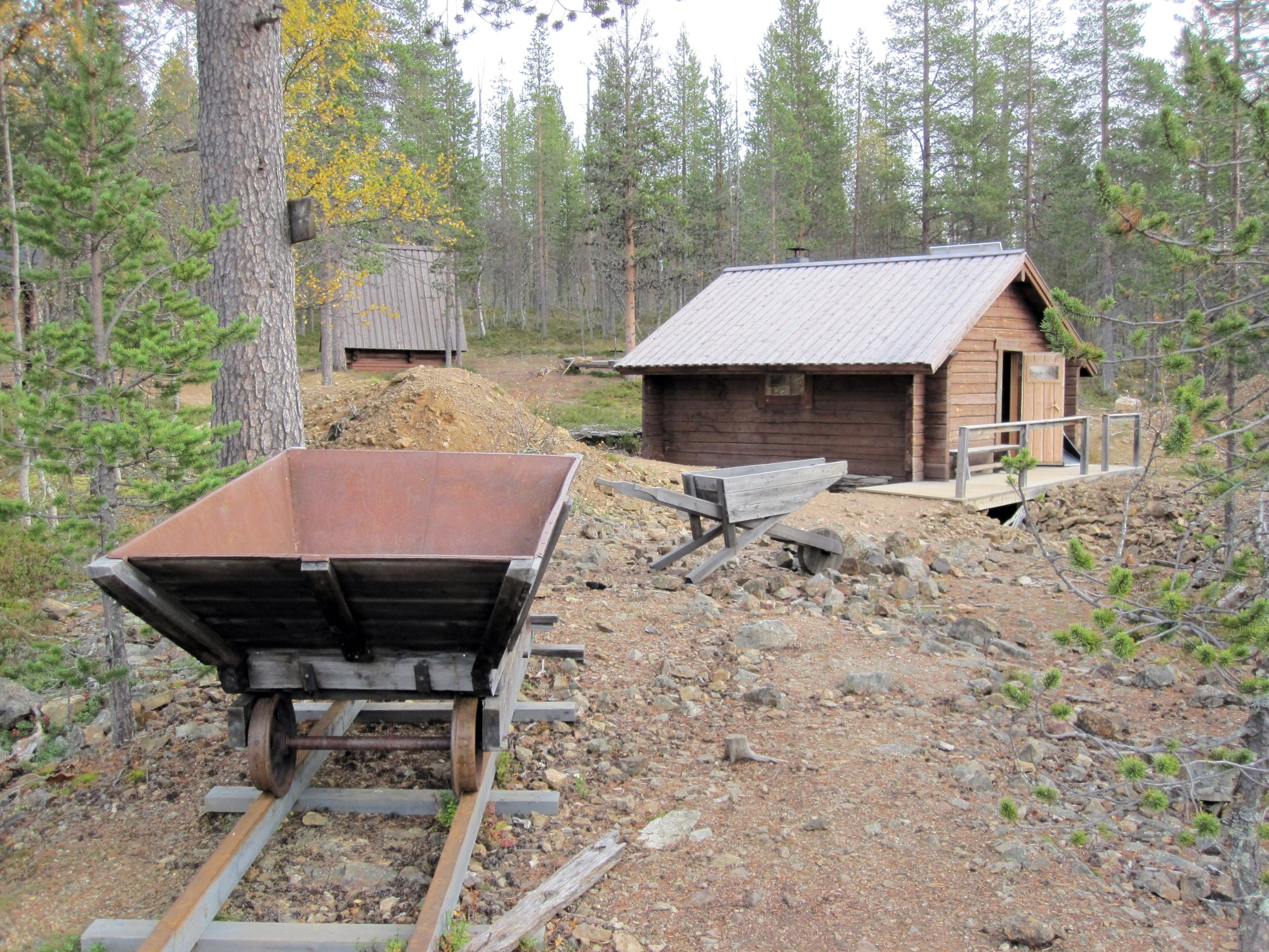 Prospektorin kultakaivos Inarin Laanilassa. Kuvassa jälkikäteen paikalle rakennettu kaivosrata kuuppavaunuineen ja kaivoskuilun päälle rakennettu päivätupa.